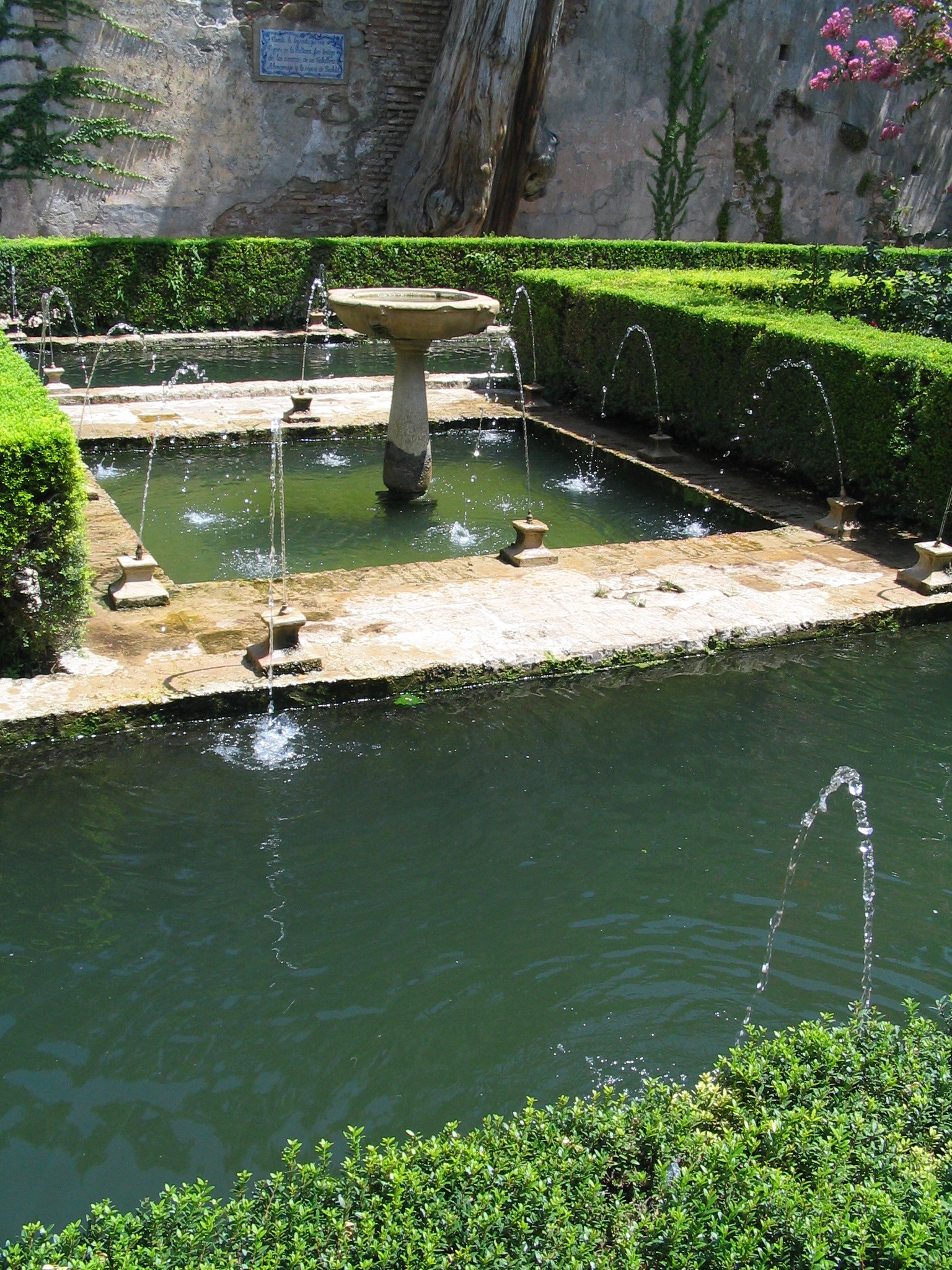 Bassins du Palais du Generalife, Alhambra de Grenade, Espagne.